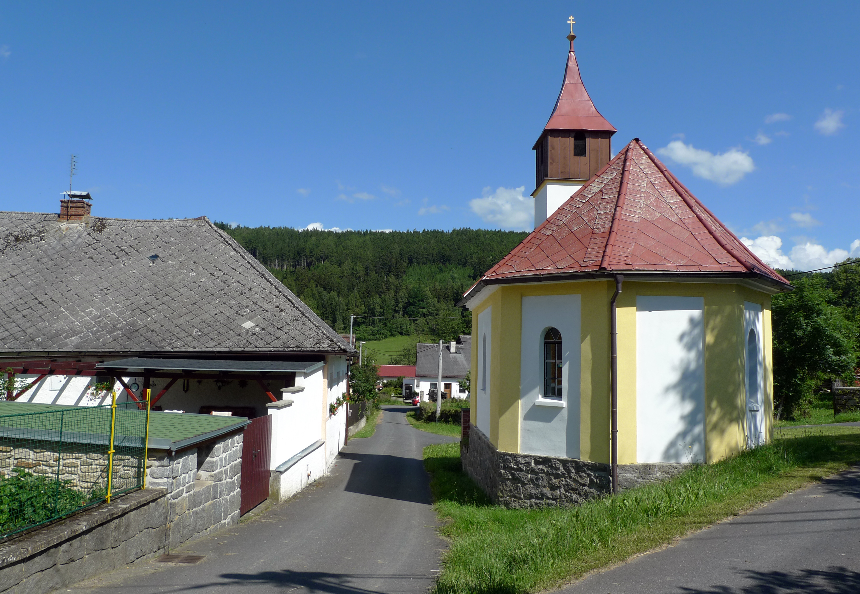 Ujčín, místní část městyse Kolinec, okres Klatovy. Kaple.